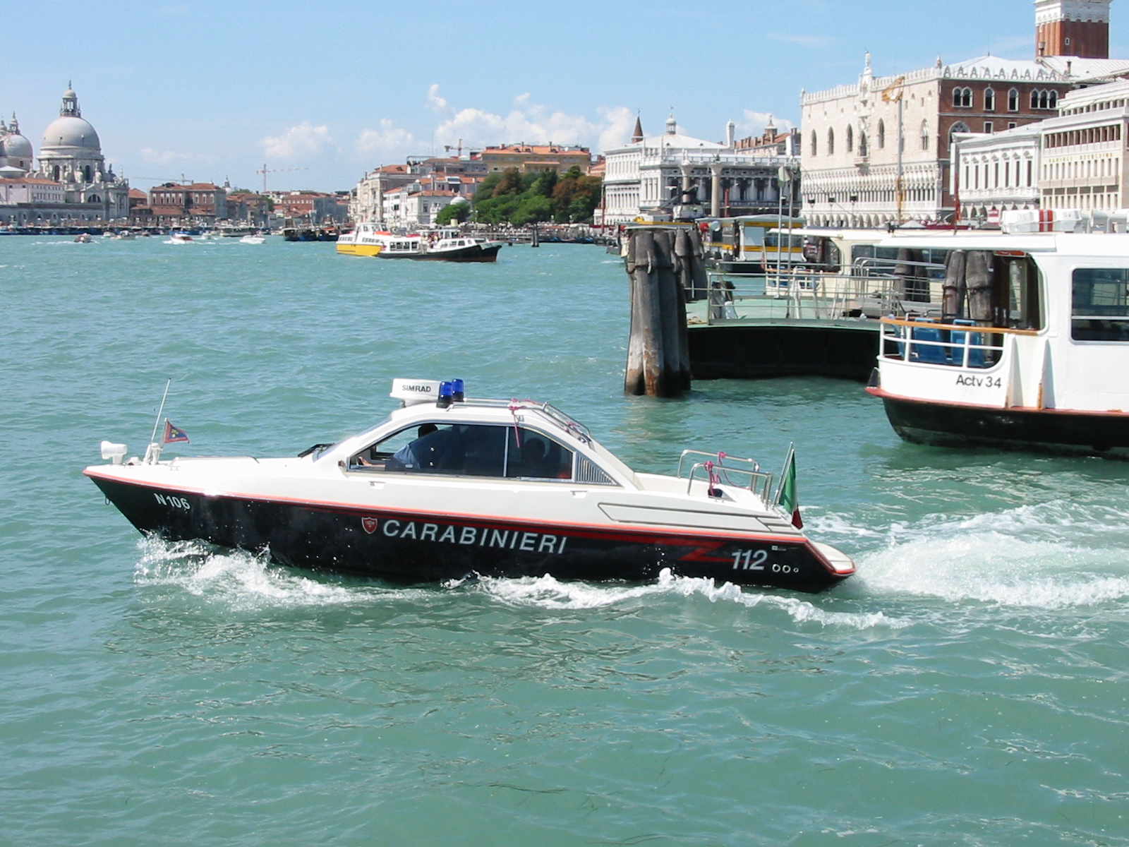 Ein Boot der Carabinieri, fotografiert an der Anlegestelle San Marco in Venedig – im Hintergrund (rechts) ist der Campanile di San Marco teilweise zu erkennen.